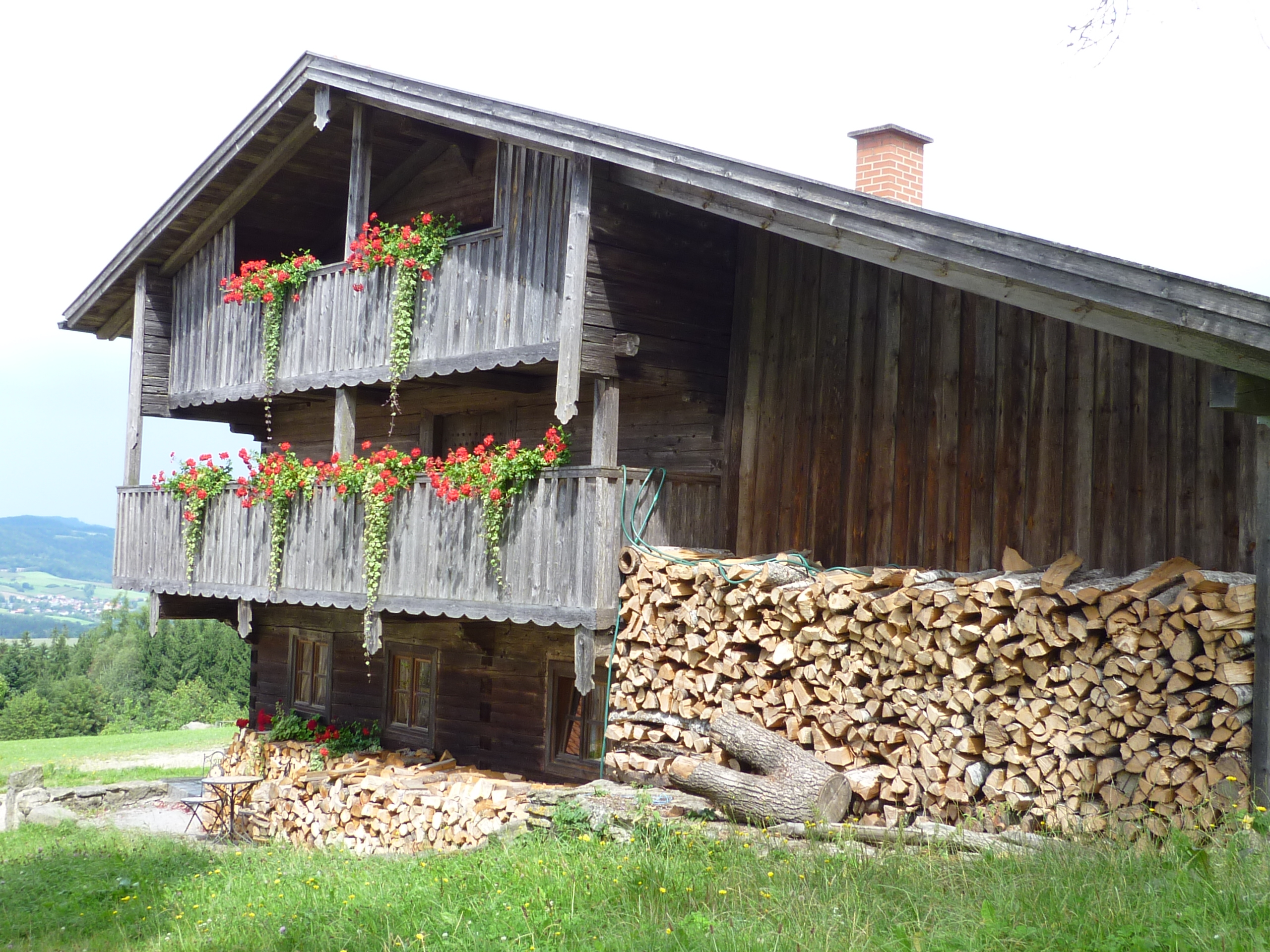 Altes Bauernhaus im Ortsteil Gallner bei Konzell. Zu dem kleinen Weiler gehören eine Kirche und 2 Häuser. Der gesamte Ort steht unter Denkmalschutz und gehört zur Liste der Baudenkmäler in Konzell, Landkreis Straubing-Bogen. Hier die Giebelansicht des alten Bauernhauses.